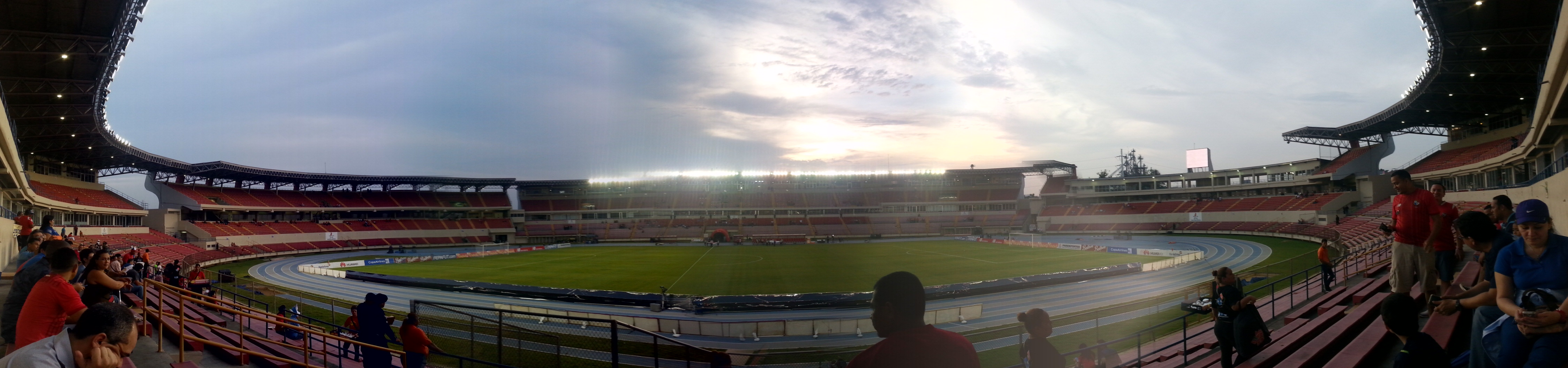 Estadio Rommel Fernández, ciudad de Panamá, Panamá.